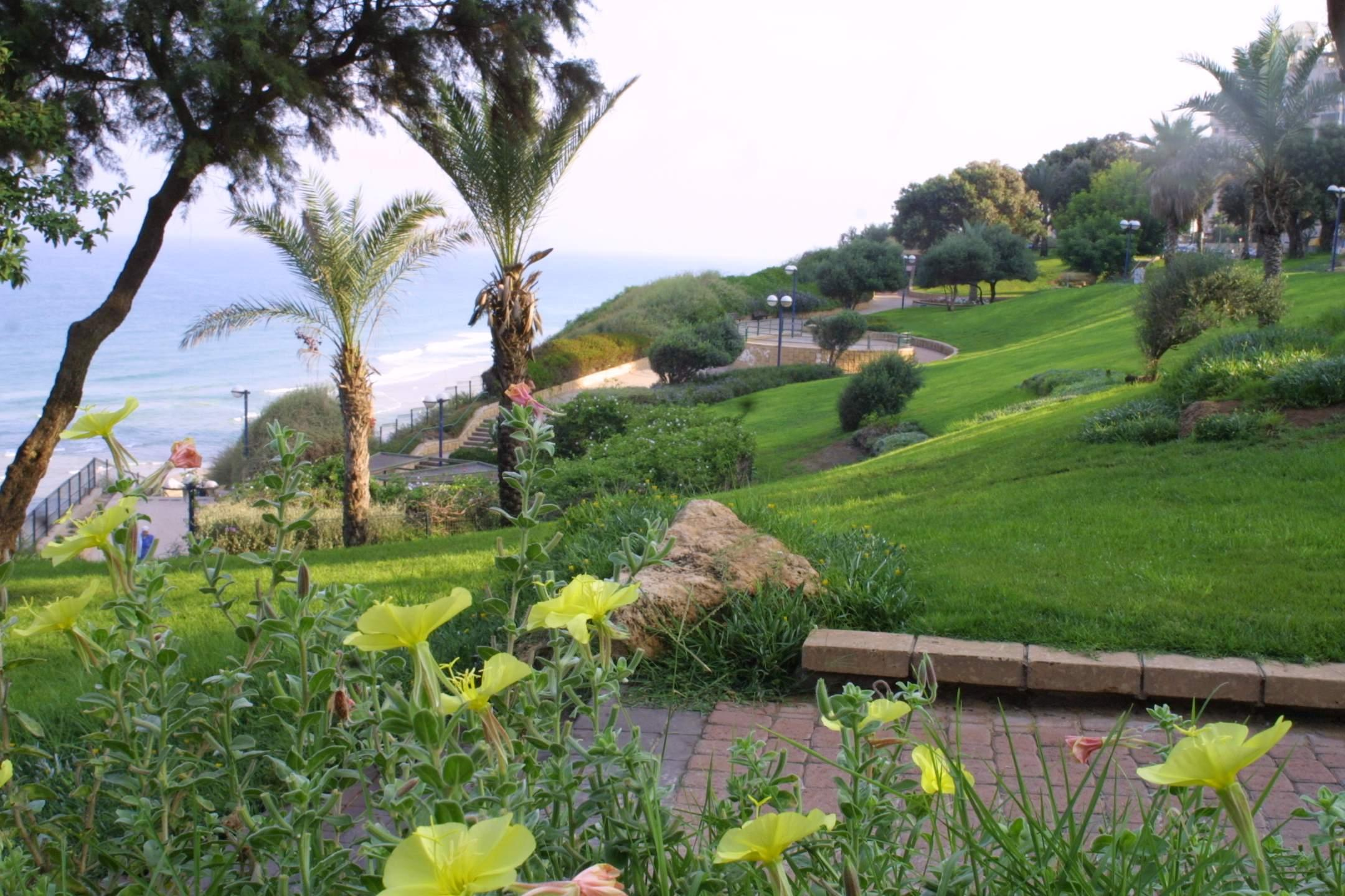 מבט על טיילת שקד לאורך החוף הצפוני של נתניה טשדרות ניצה